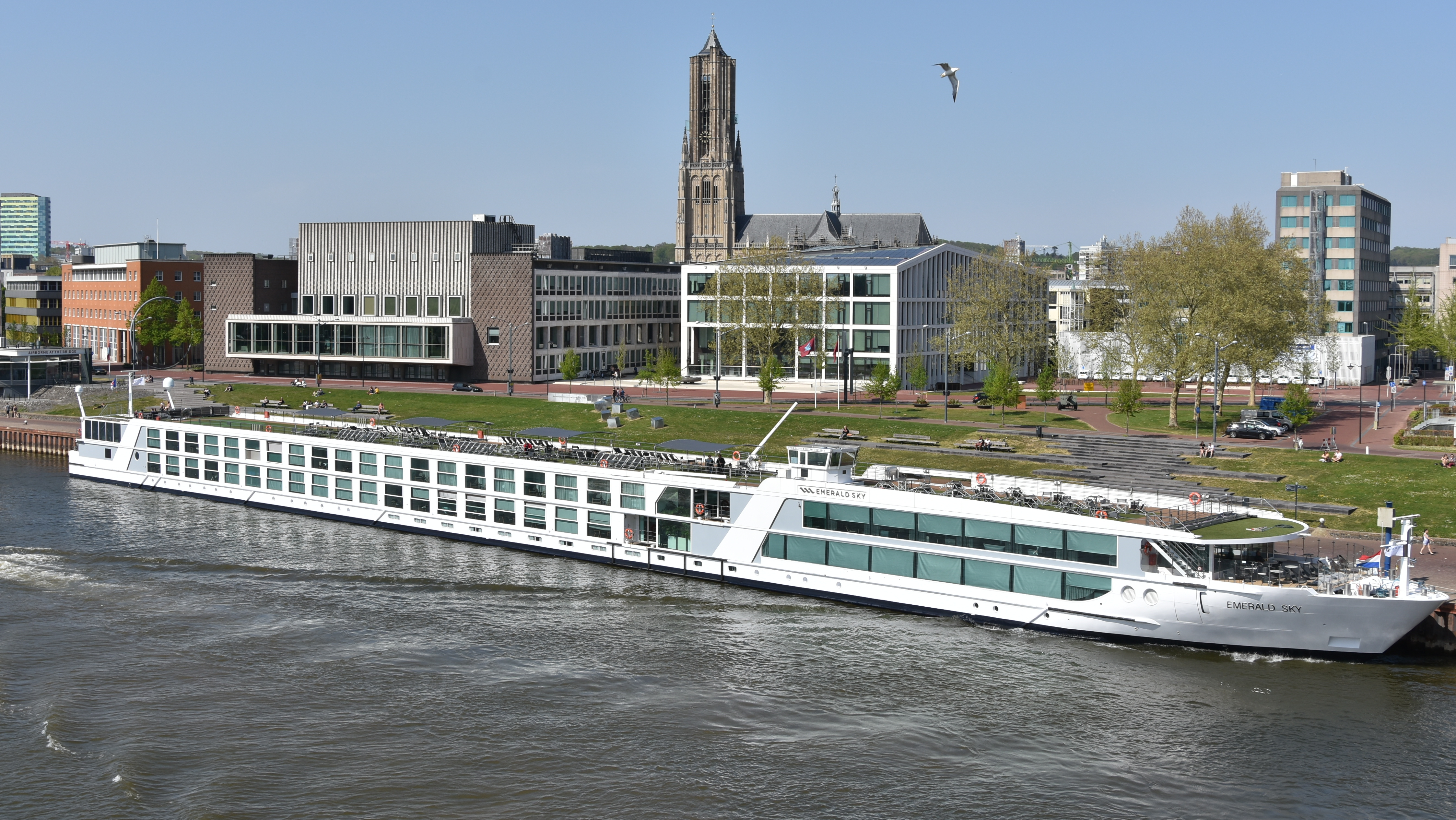 Arnhem 22-04-2019 14-15-13